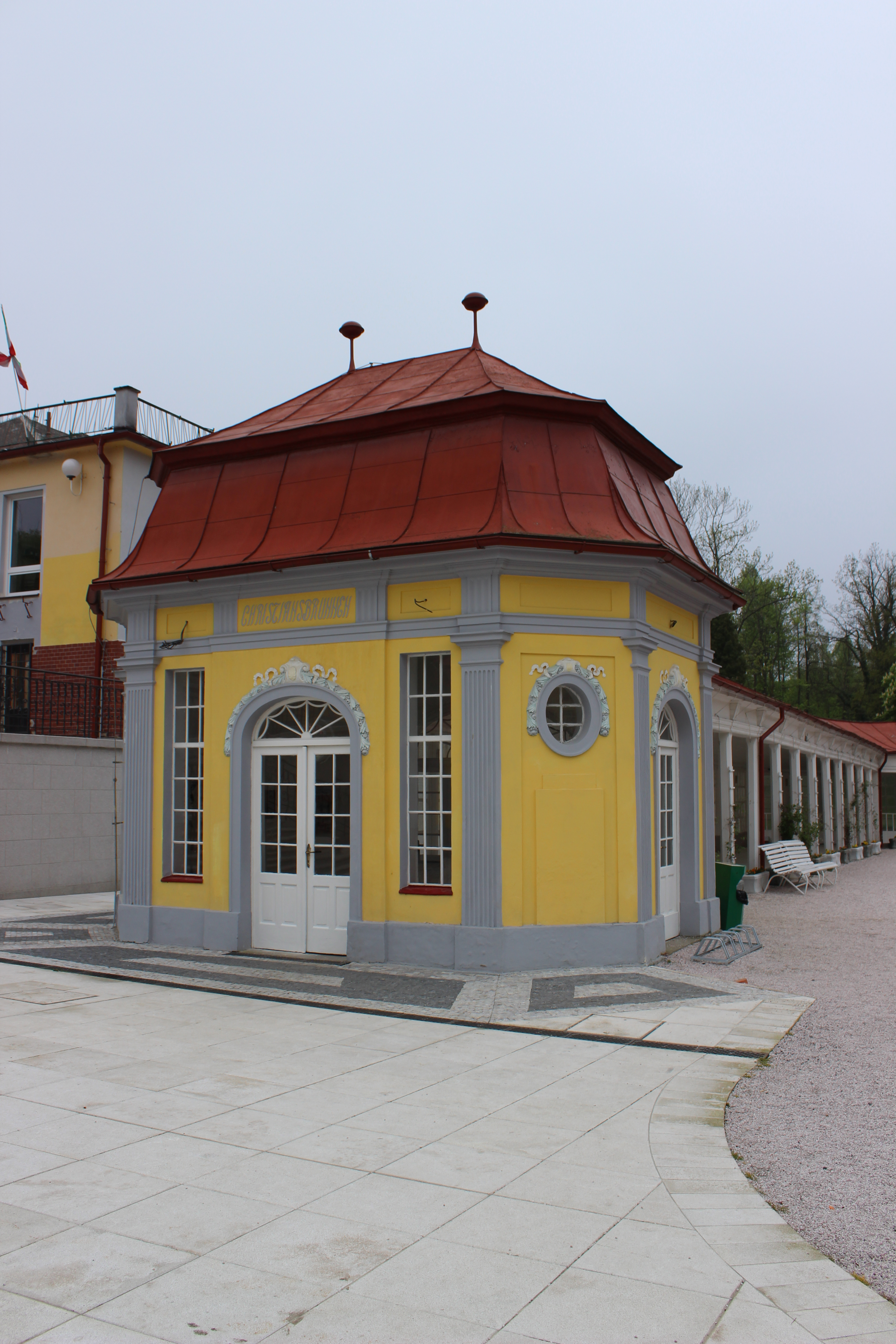 Objekt pitné sítě na kolonádě v Lázních Libverdě.